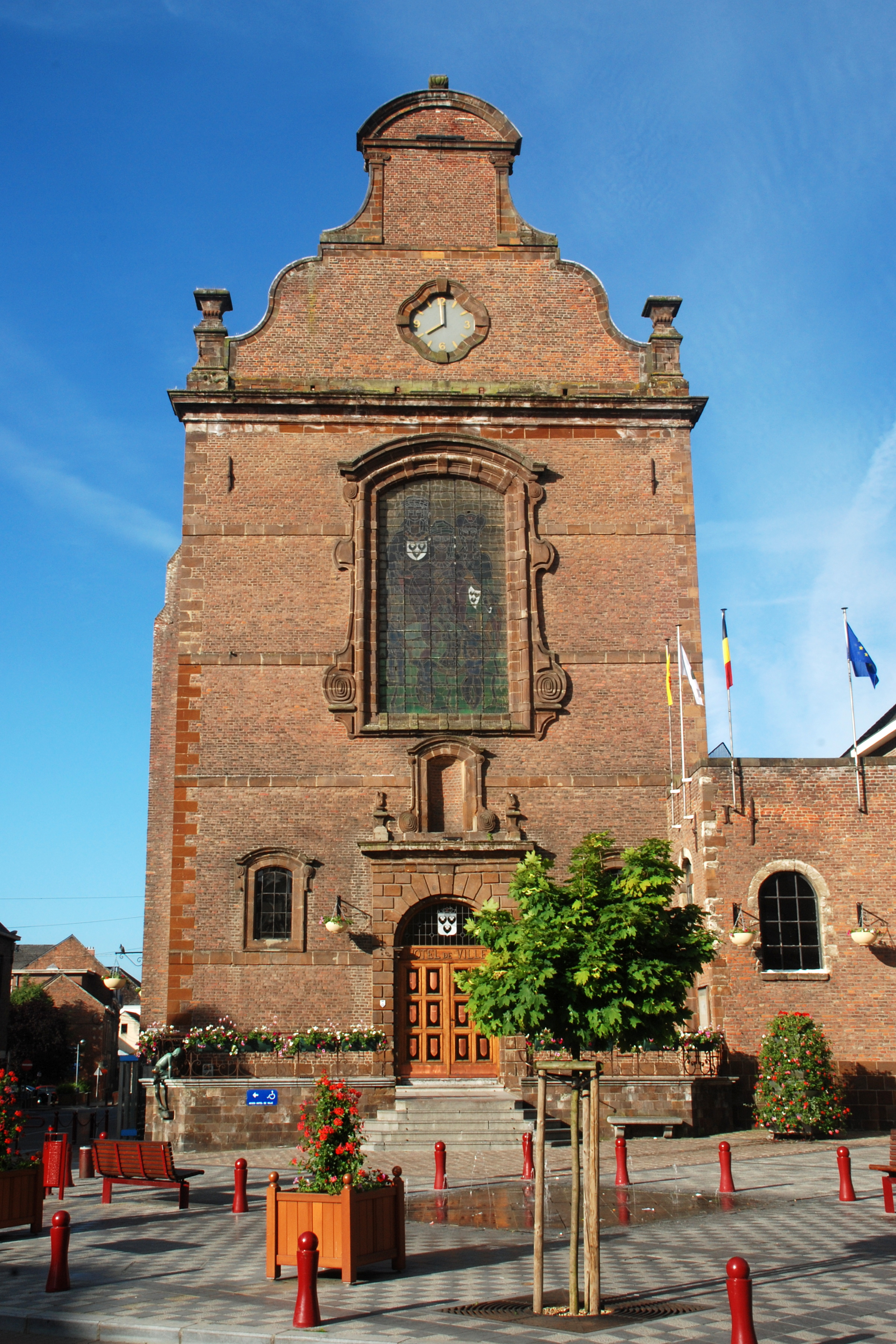 Belgique - Wallonie - Wavre - Ancien couvent des Carmes Chaussés (actuel hôtel de ville)